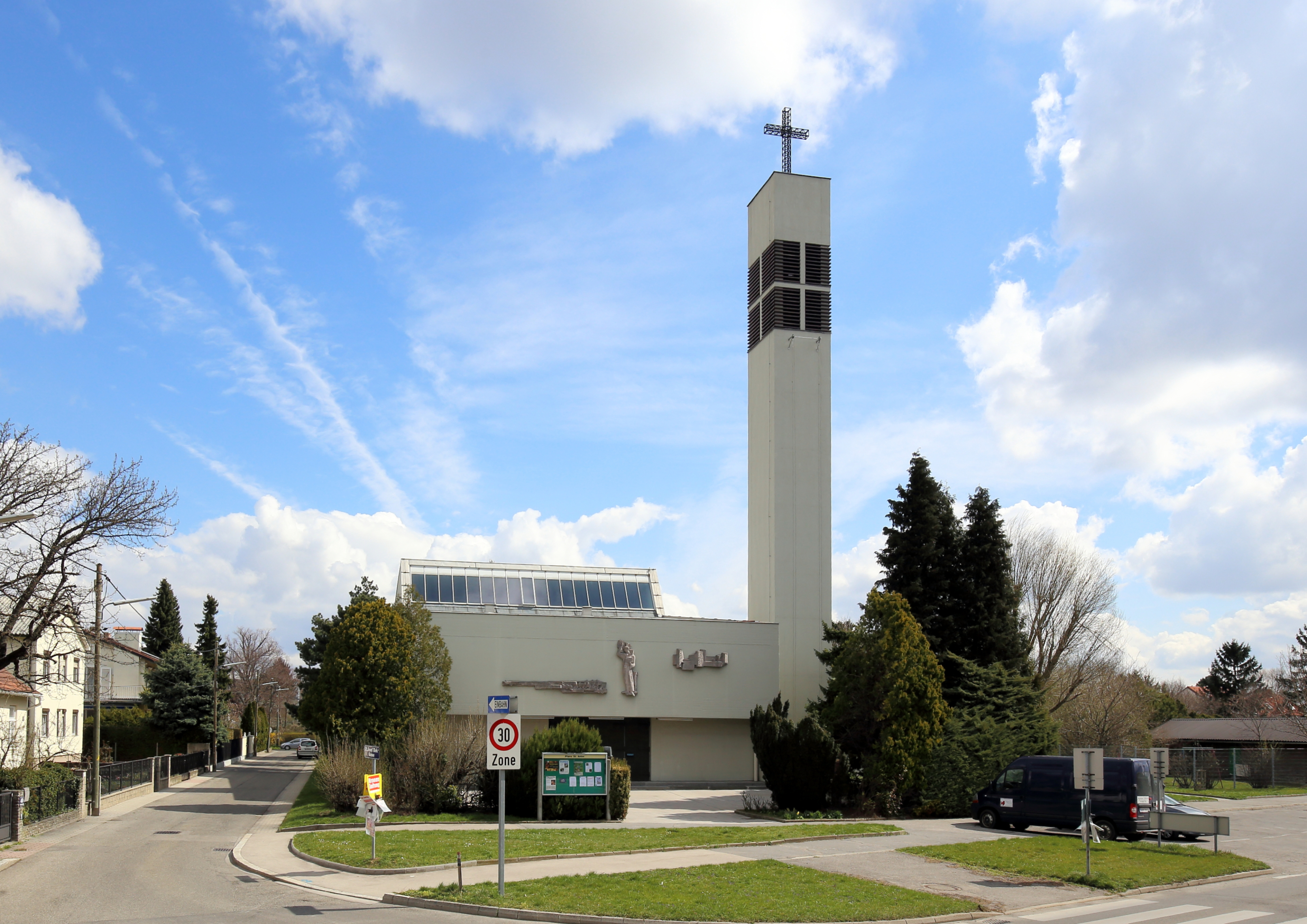 Die Pfarrkirche St.-Antonius-von-Padua in Schwarzlackenau, eine Siedlung im 21. Wiener Gemeindebezirk Floridsdorf. Die Kirche wurde nach Plänen des Architekten Leo Splett errichtet und 1964 geweiht.